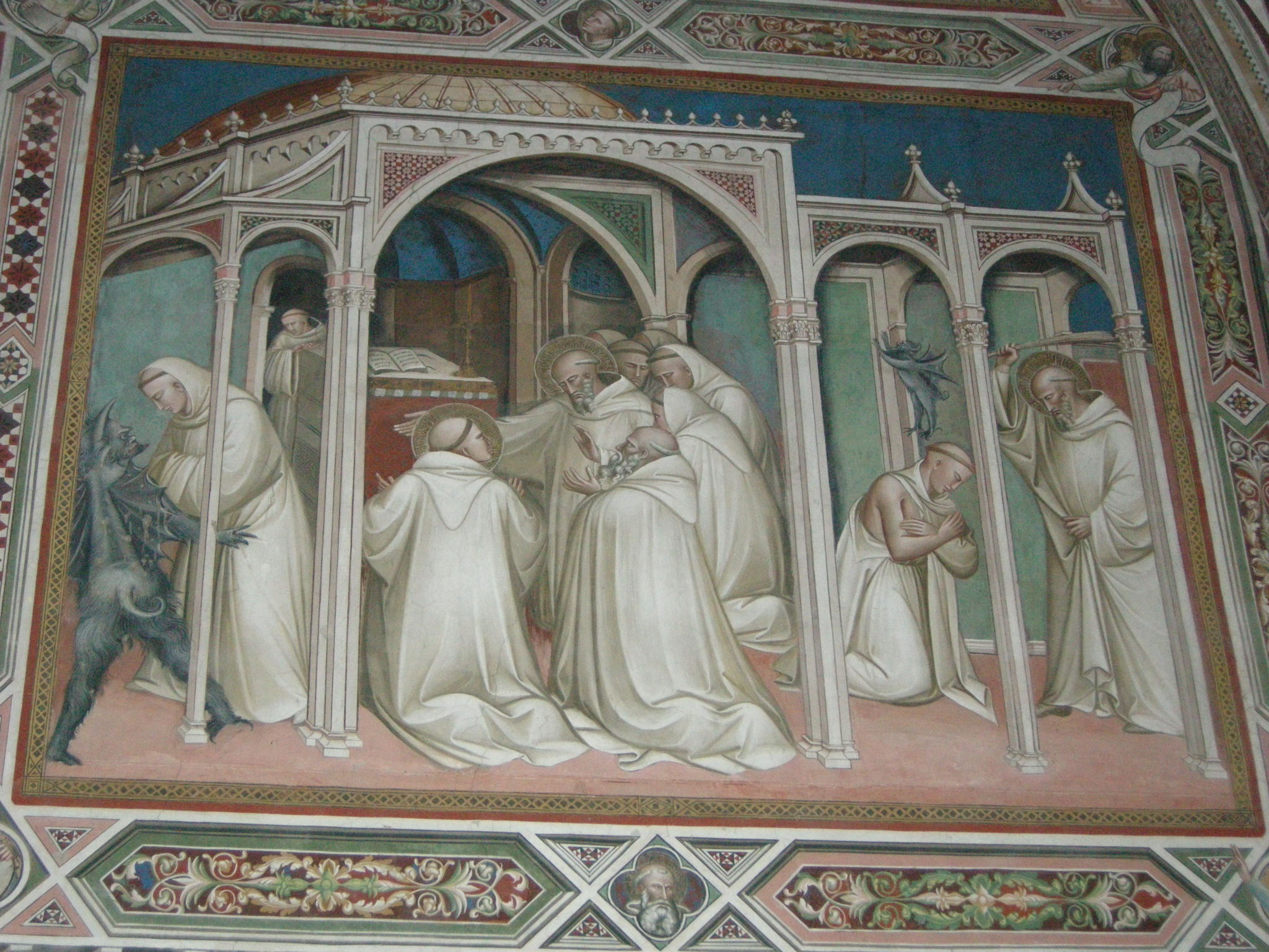 Spinello aretino, storie di san benedetto, episodio 10, benedetto riprende un monaco rapito dal demonio e lo esorcizza fustigandolo